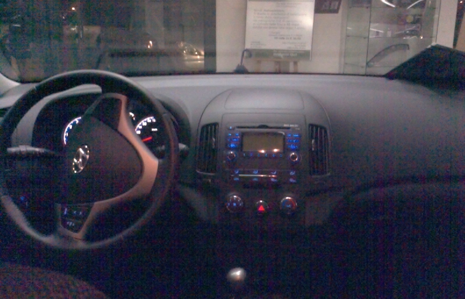 Hyundai i30 interni